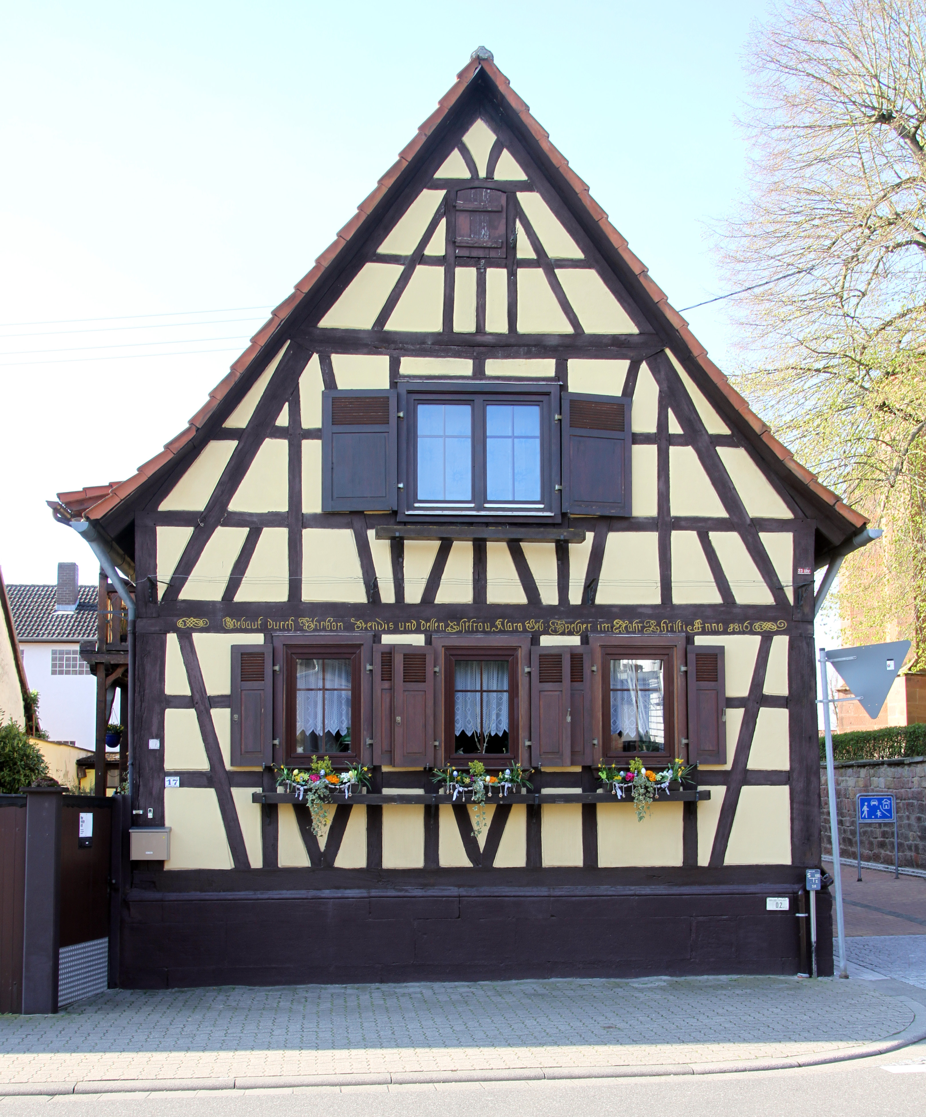 Rohrbach (Pfalz)